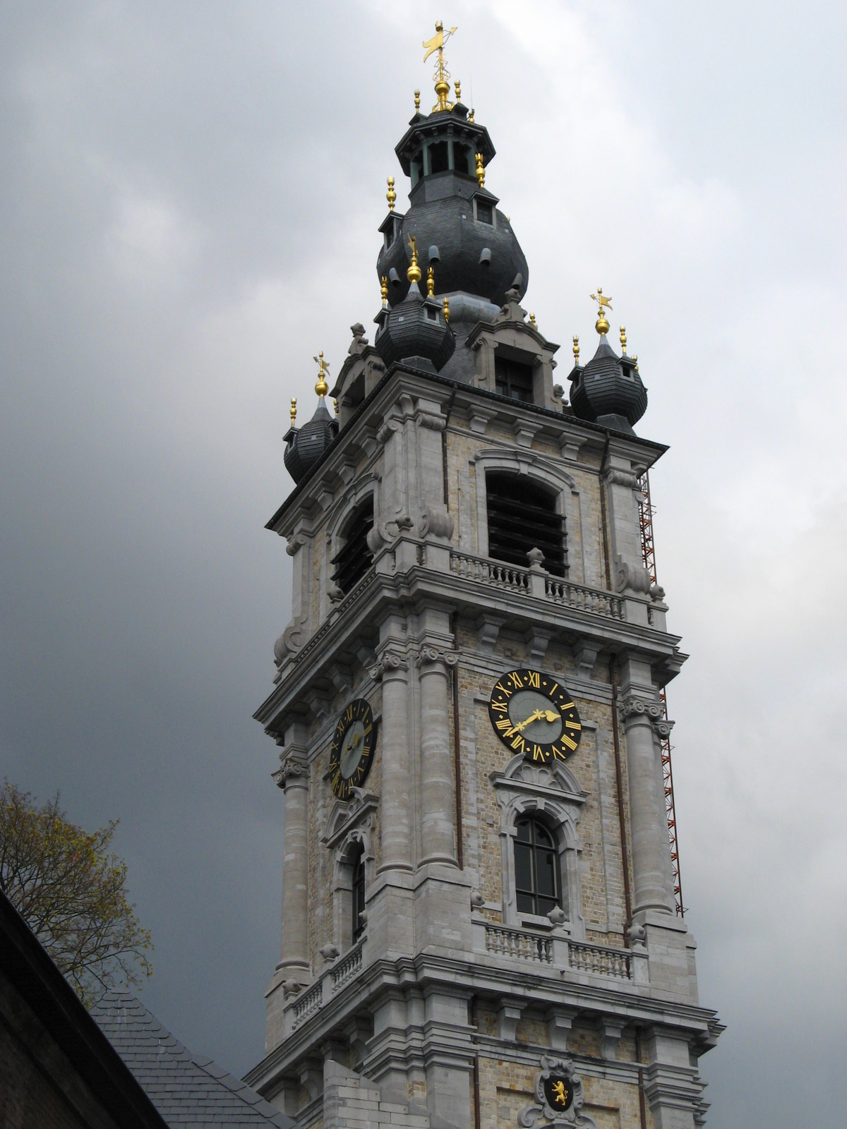 Mons, Belgium